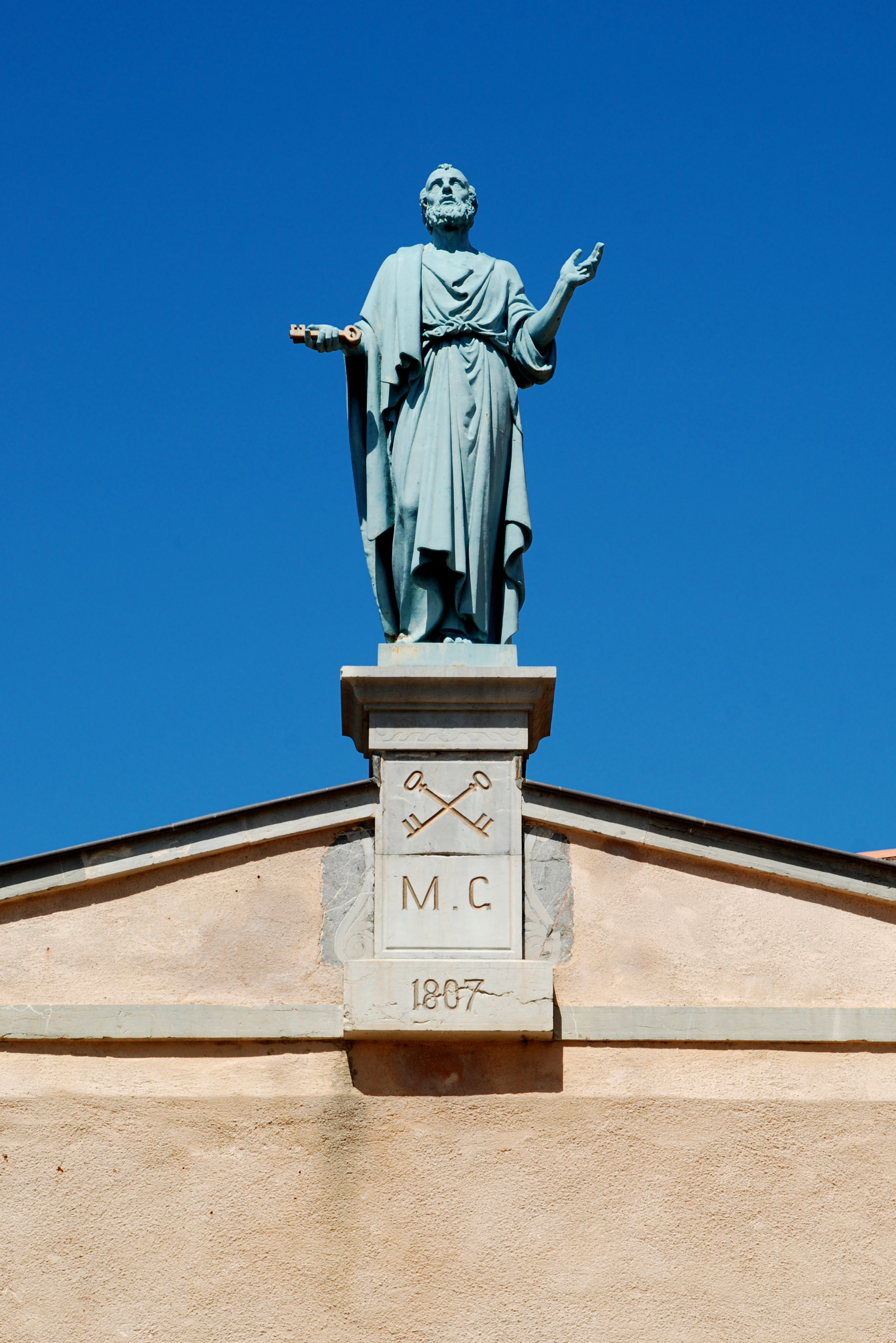 France - Languedoc - Hérault - Église Sainte-Marie de Quarante .